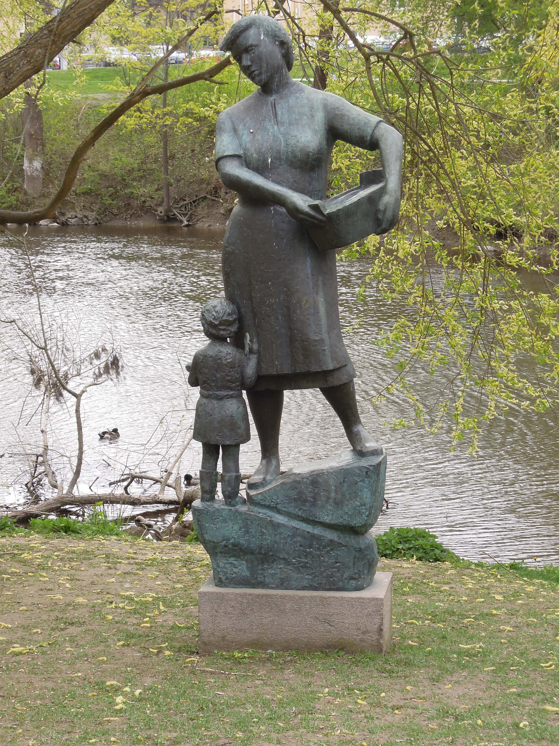 Tvätterskan / Vardag. Yngve Andersson 1968. Brons Djäknebron i Västerås.